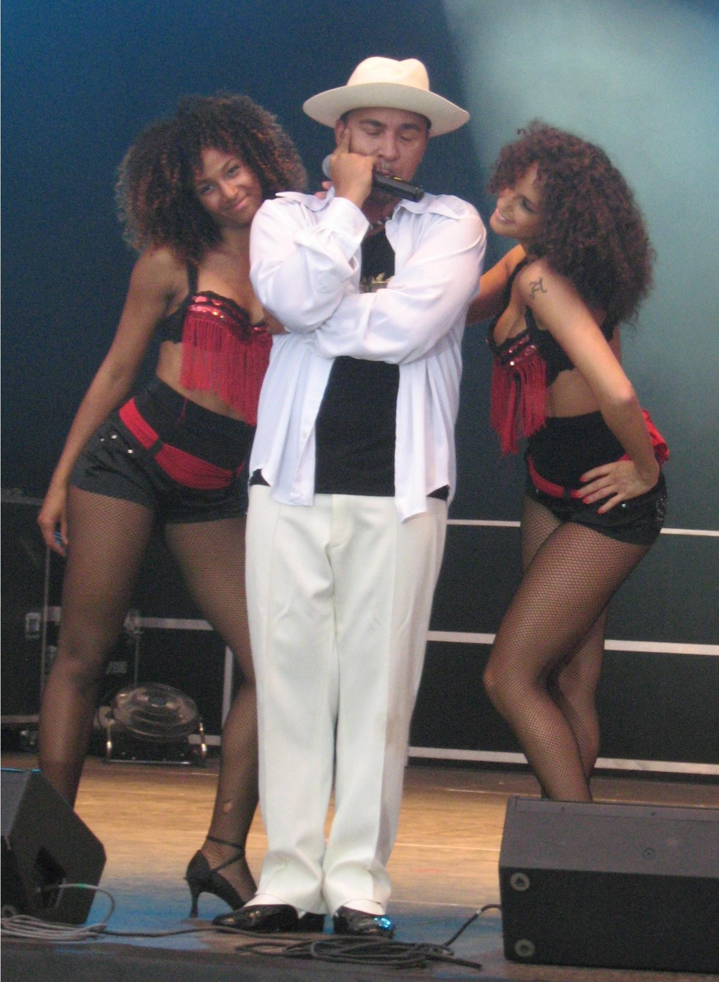 Lou Bega w Międzyzdrojach